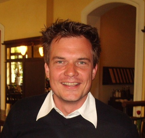 Johannes Raspe während eines Interviews in München